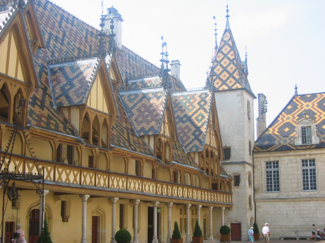 hospices de Beaune, Bourgogne, France. Cour d'honneur.